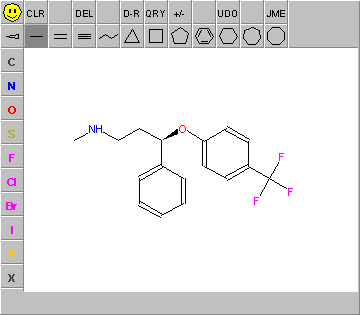 JME Molekül editörü.